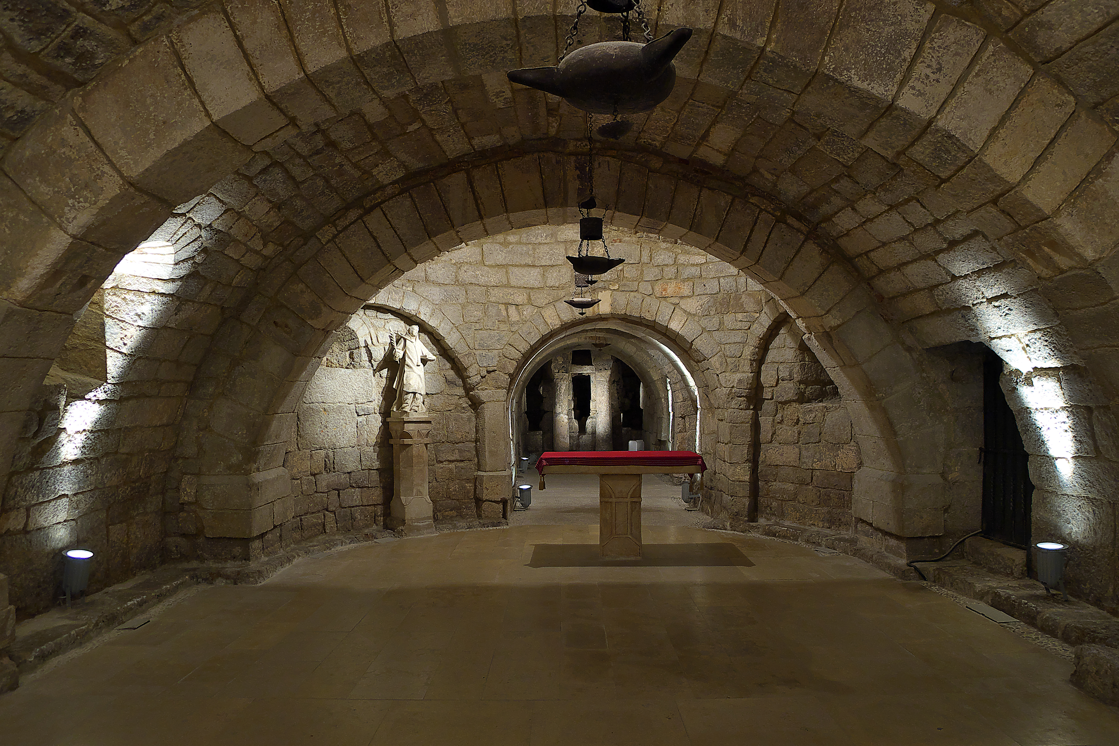 Sancho Garcés III de Navarra (1035) amplía la cripta de San Antolín con una iglesia prerrománica.